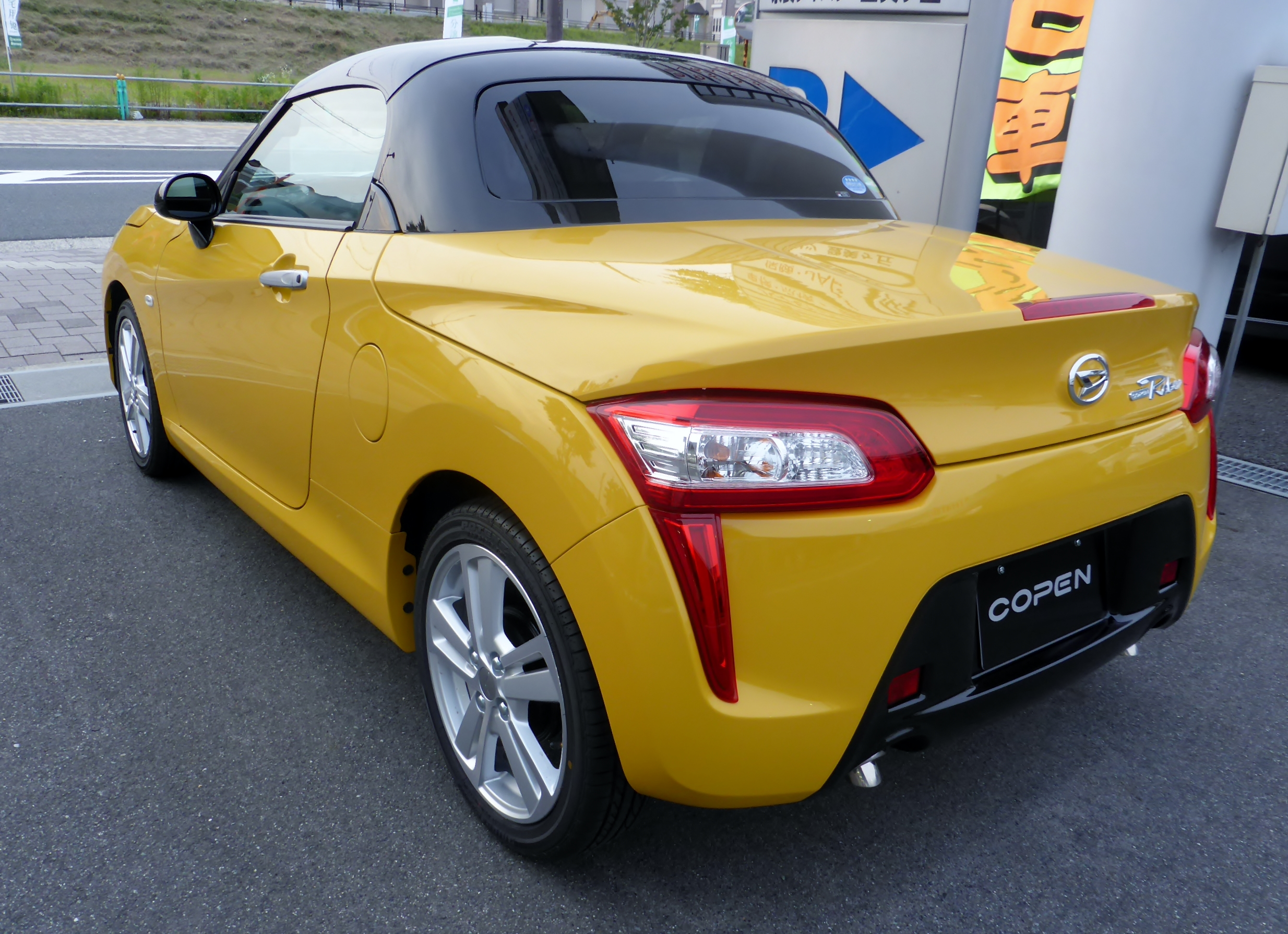 LA400K型ダイハツ・コペンローブをリアから撮影。